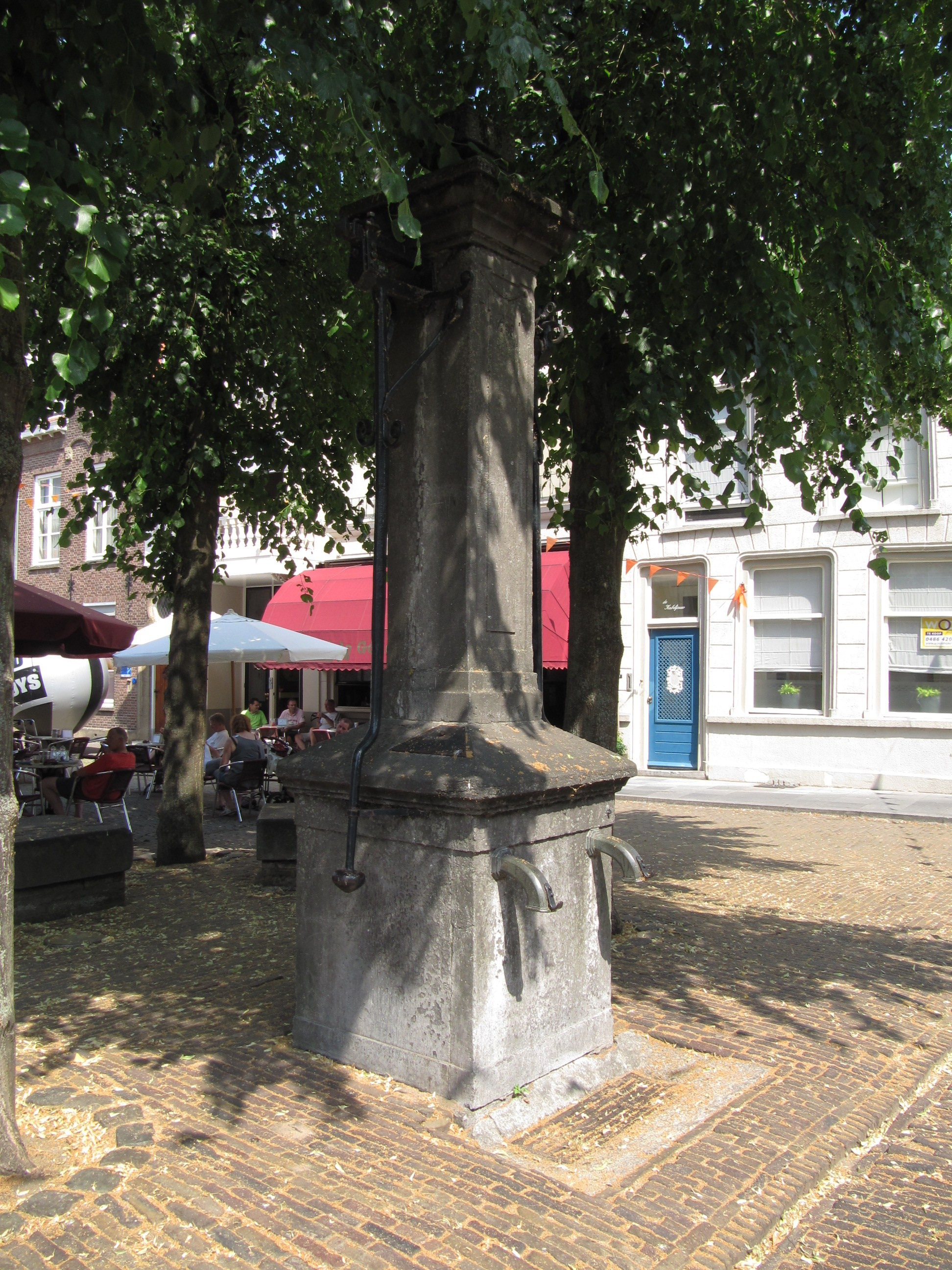 Grave - Markt - Natuurstenen pomp.jpg, rijksmonument